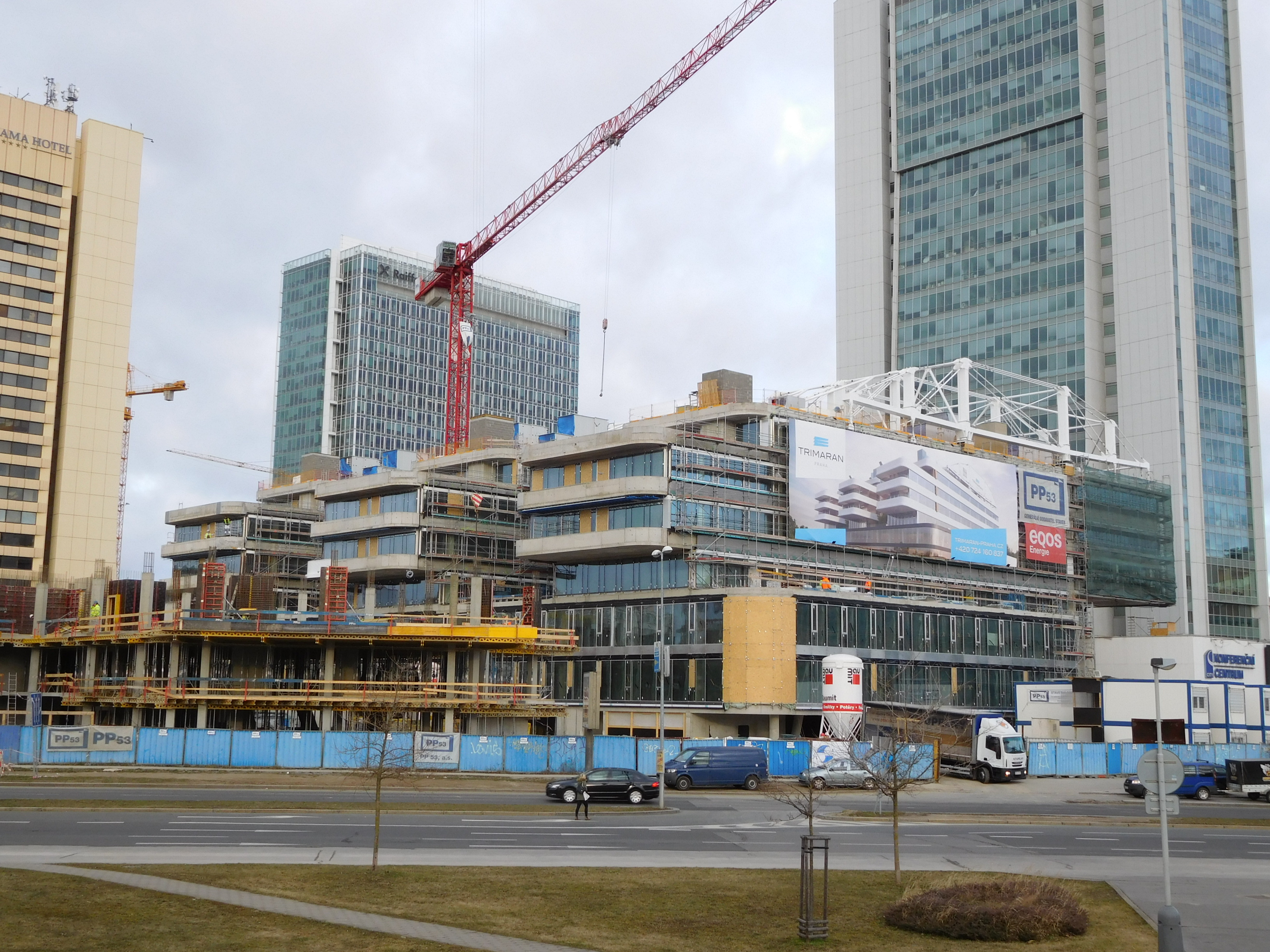 Trimaran - stavba; Praha - Pankrác